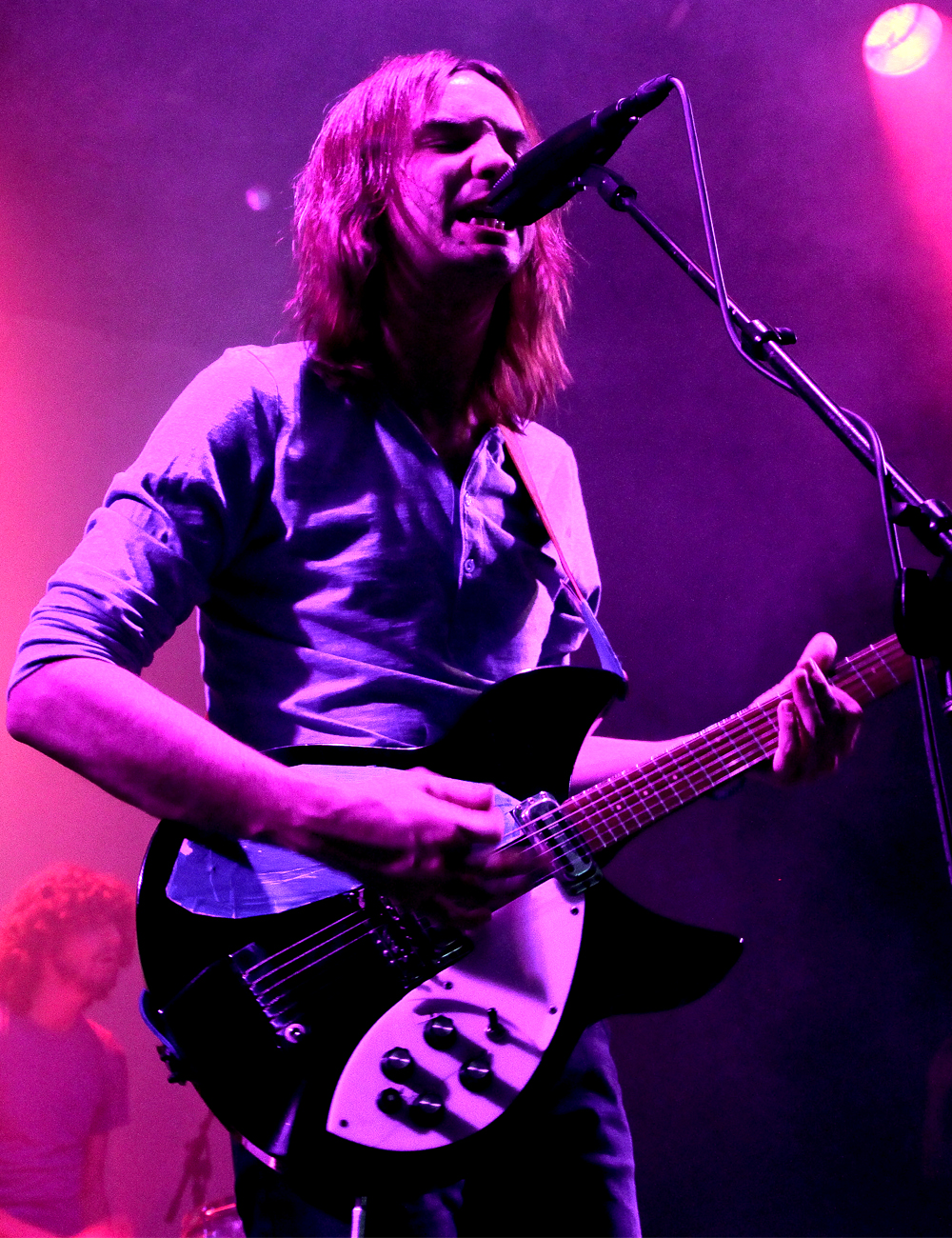 Kevin Parker em um concerto com a Tame Impala